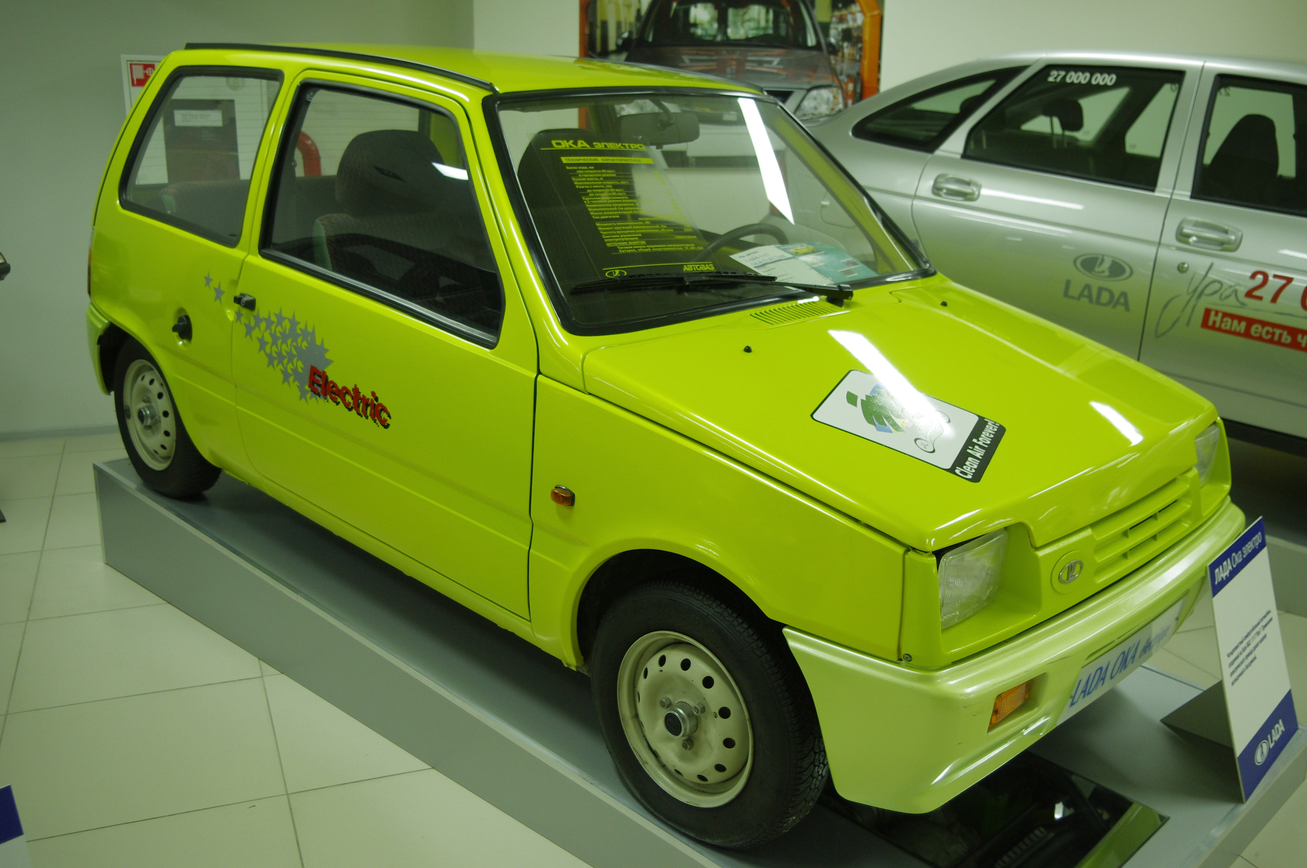 Lato 2013.